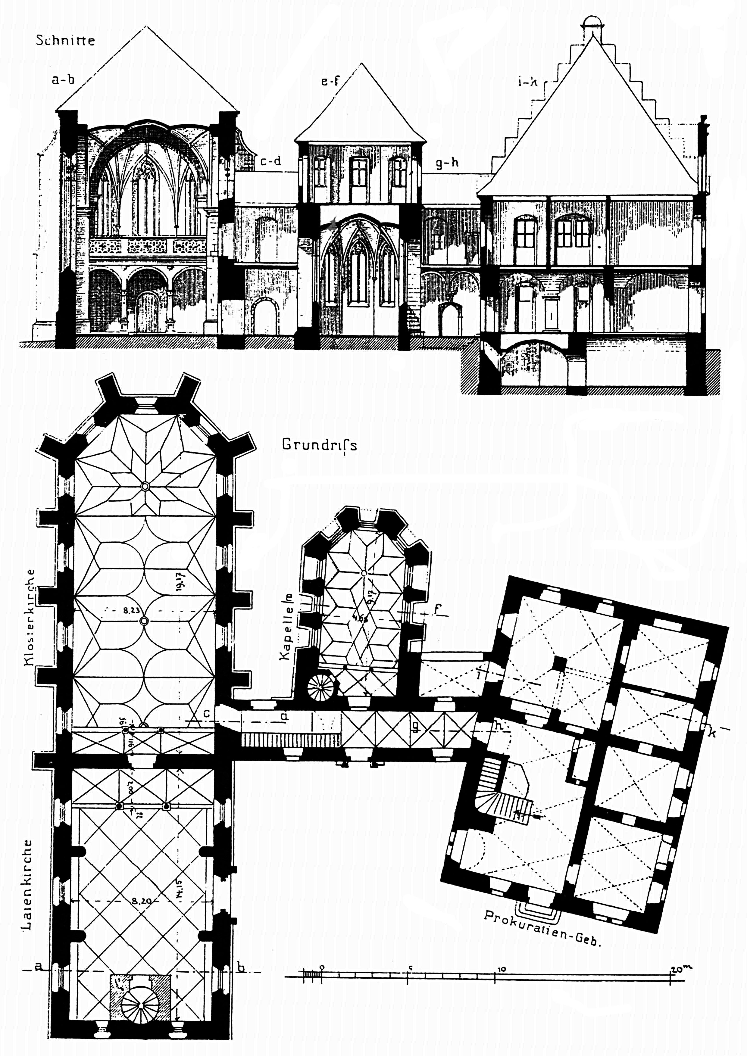 Grundriss und Schnitt der Kartause Pons Mariae Astheim.